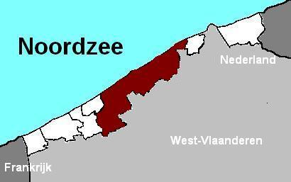 Zelf gemaakt kaartje van de Vlaamse Middenkust van Middelkerke tot Wenduine